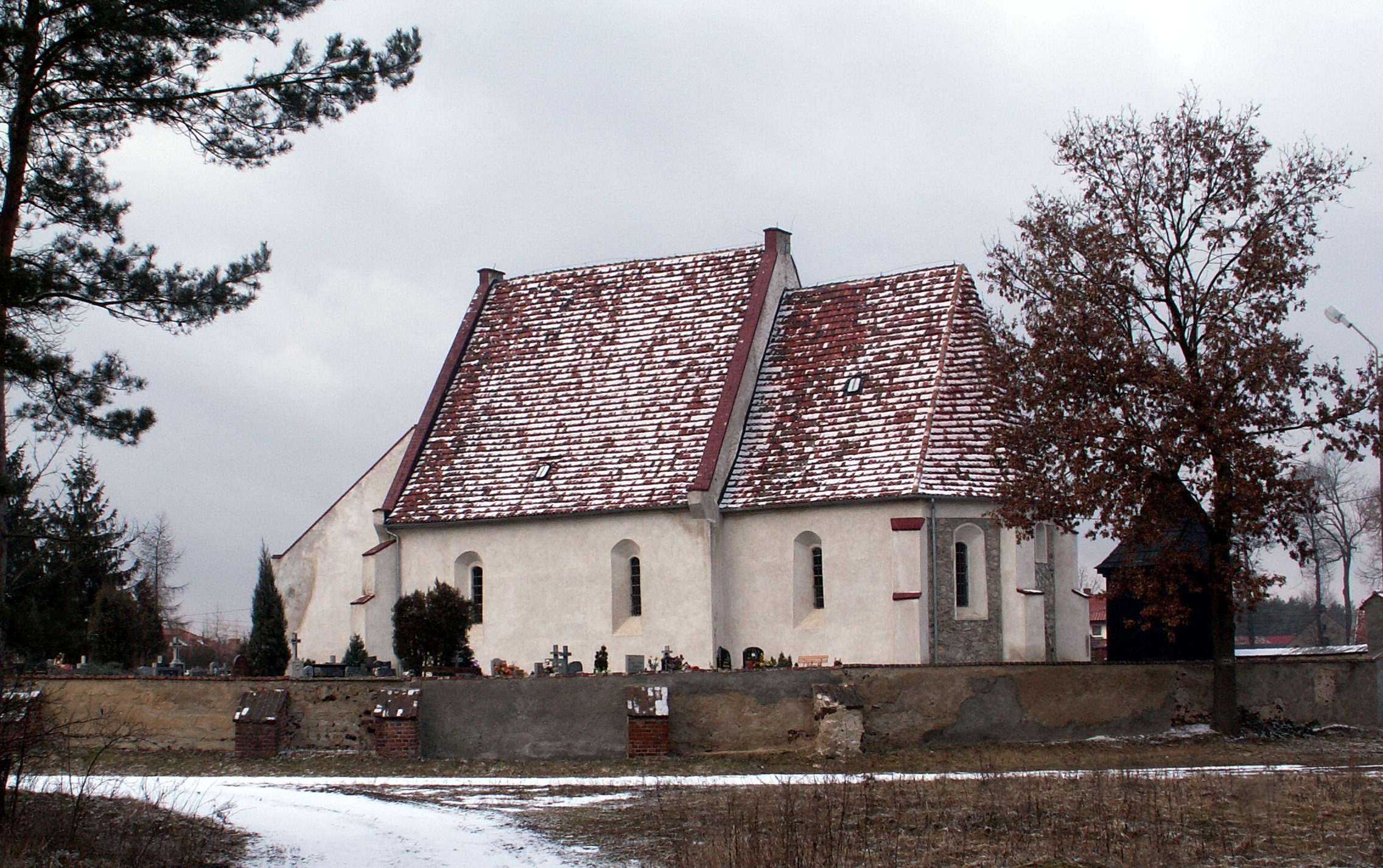 Kościół z XIII wieku